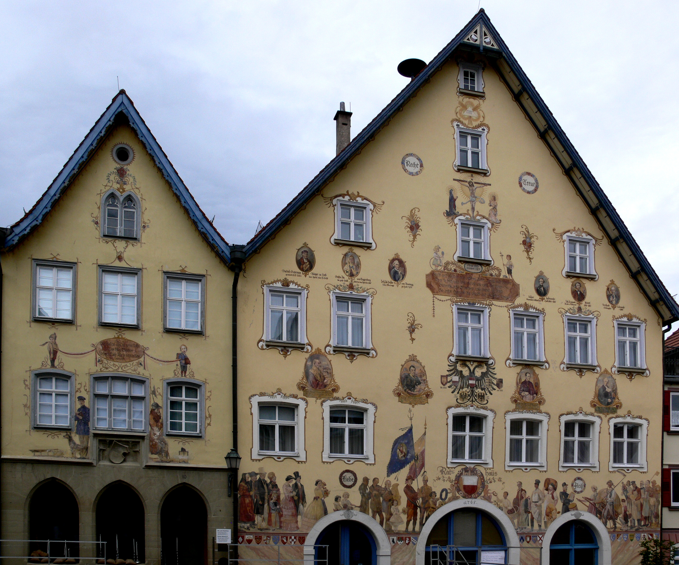 Horb am Neckar Rathaus und Wachthaus